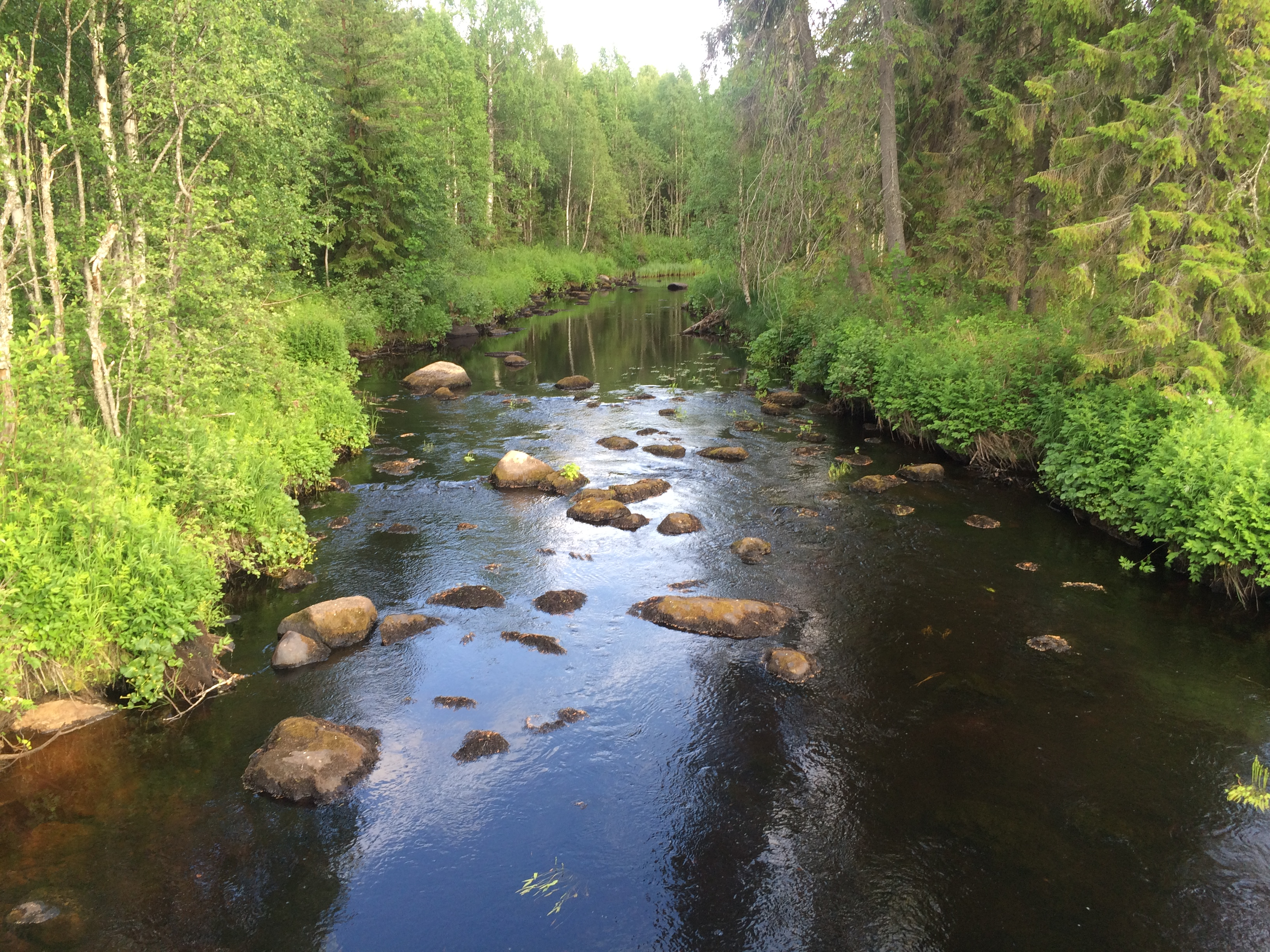 Кумбукса (приток Вожмы)